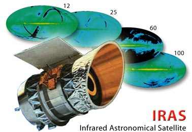 Vue d'artiste du satellite IRAS, superposé aux cartes réalisées par le satellite. Tiré d'un site de la NASA [1], donc du domaine public.